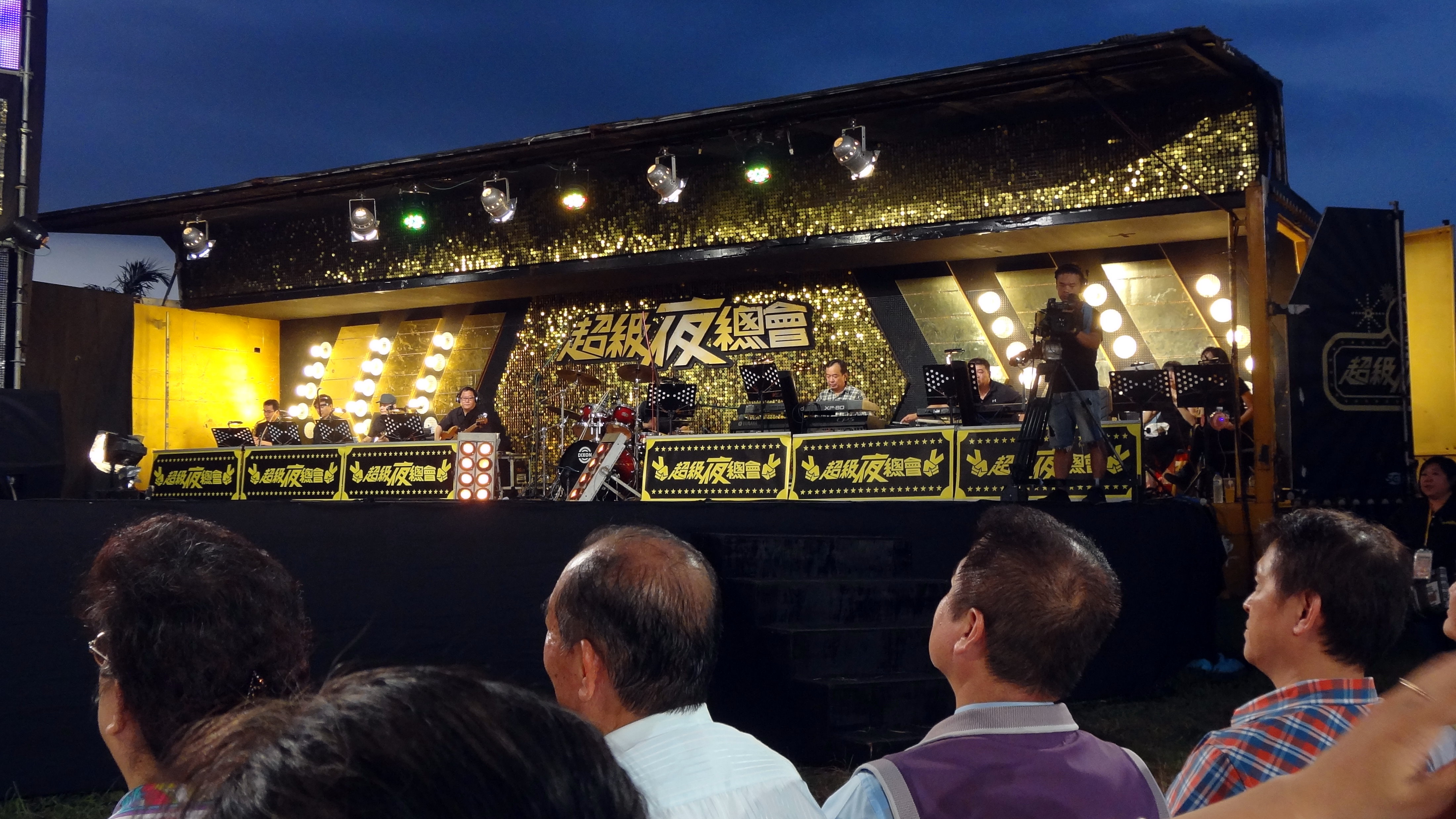 三立台灣台綜藝節目《超級夜總會》於基隆市七堵區堵南國民小學操場錄影中，舞台右側的樂隊席。樂隊席位於舞台車內，錄影時舞台車左側車身往上掀開。樂隊：詹仔大樂隊。合音：恬甜二人組。